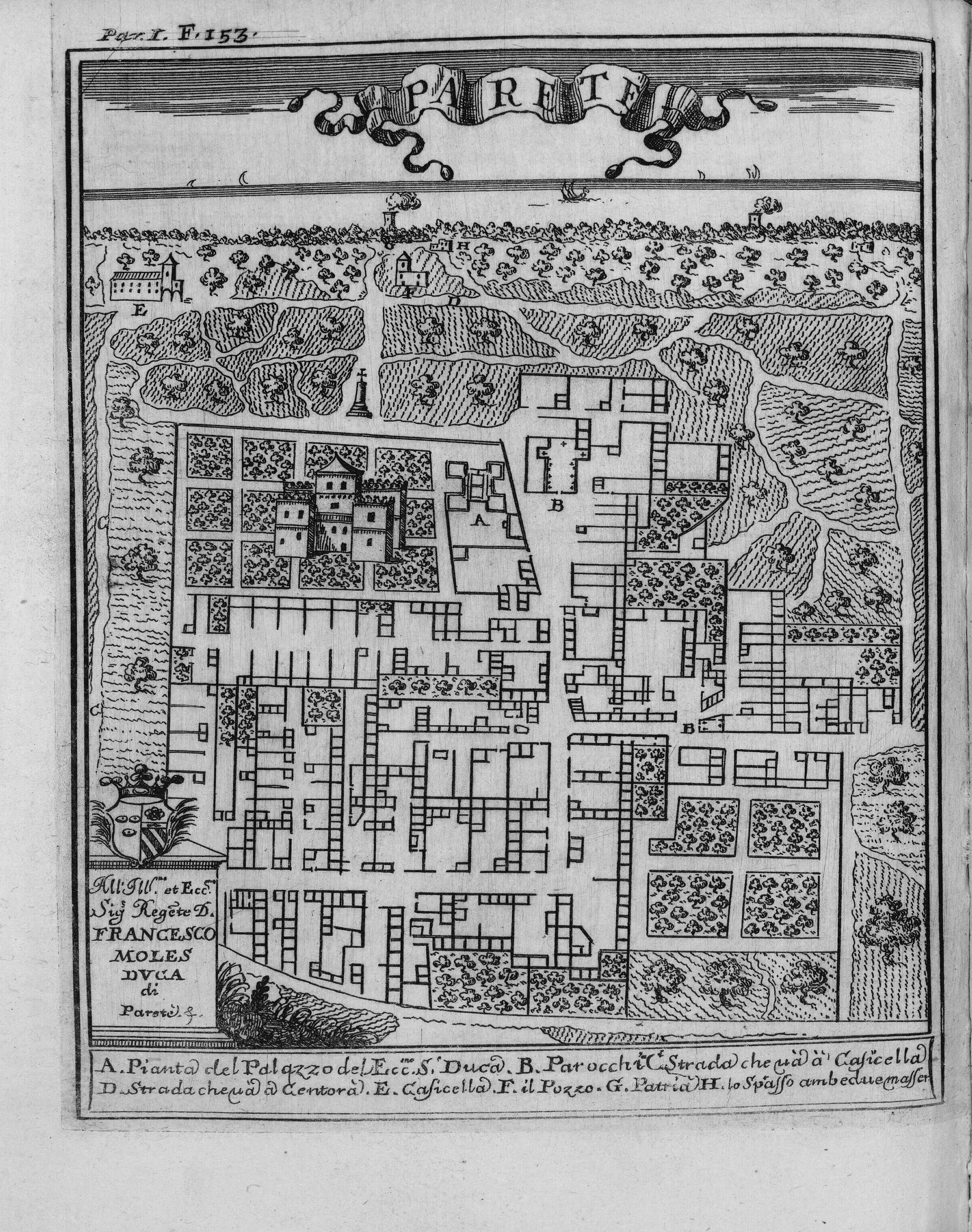 Autor: Pacichelli, Giovanni Battista, 1641-1702 Descripción bibliográfica: Il regno di Napoli in prospettiva : diviso in dodeci provincie, in cui si descrivono la sua Metropoli Fidelissima città di Napoli ... Opera postuma divisa in tre parti / dell'abatte Gio. Battista Pacichelli ; Parte prima [-terza] ... Del regno di Napoli in prospettiva / dell'abate Pacichelli. Parte prima. - In Napoli : nella Stamperia di Michele Luigi Mutio, 1703. - v. : principalmente il.; 4º . - Inic. adorn. y frisos dec. - Grab. calc. y h. pleg. grab. calc. de mapas de Cassianus de Silva. Ilustrador: Cassiano De Silva, Francesco, il. Impresor: Muzio, Michele Luigi, imp. Lugar de impresión: Italia. Nápoles Localización: Vea la ilustración en su contexto